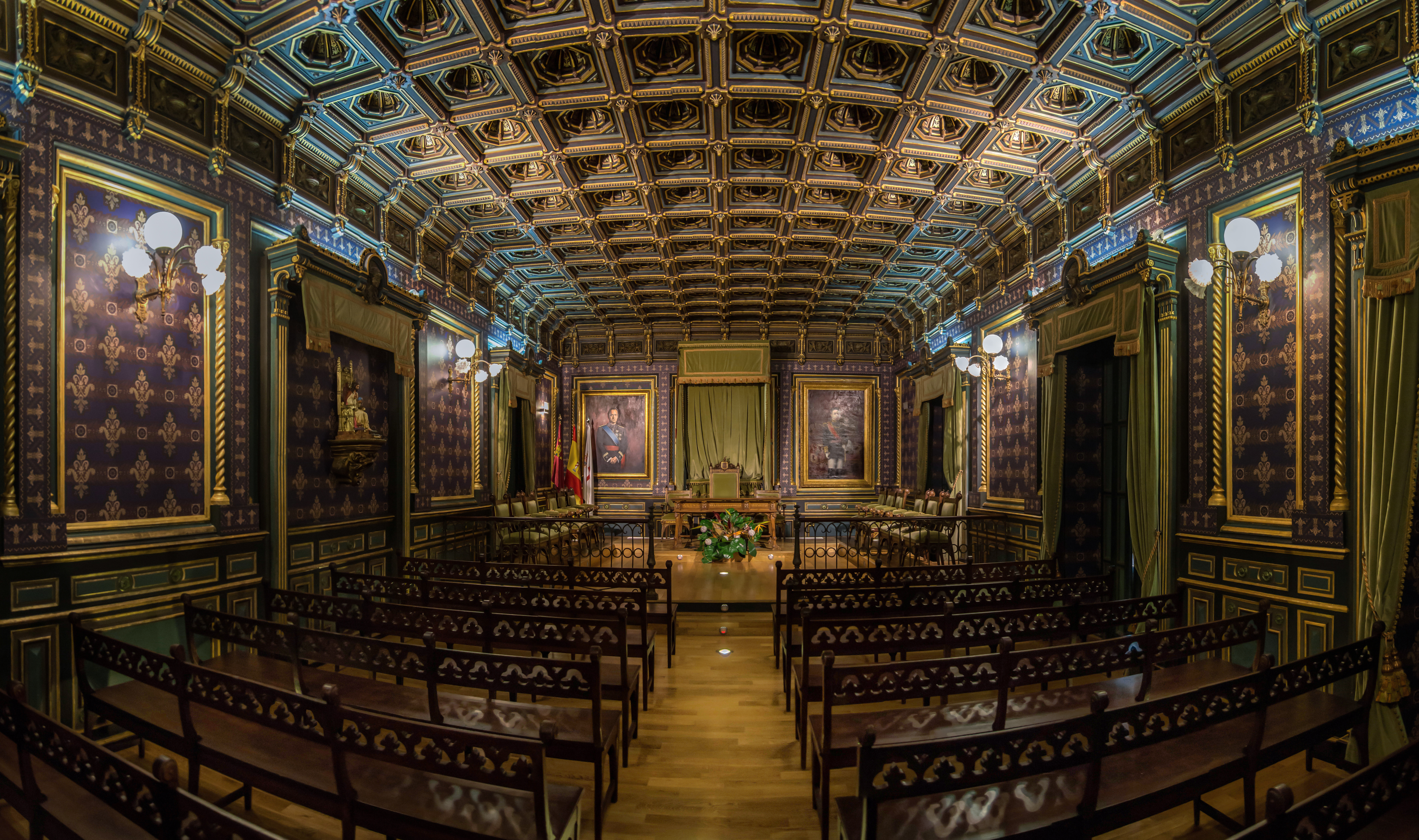 Edificio del Ayuntamiento